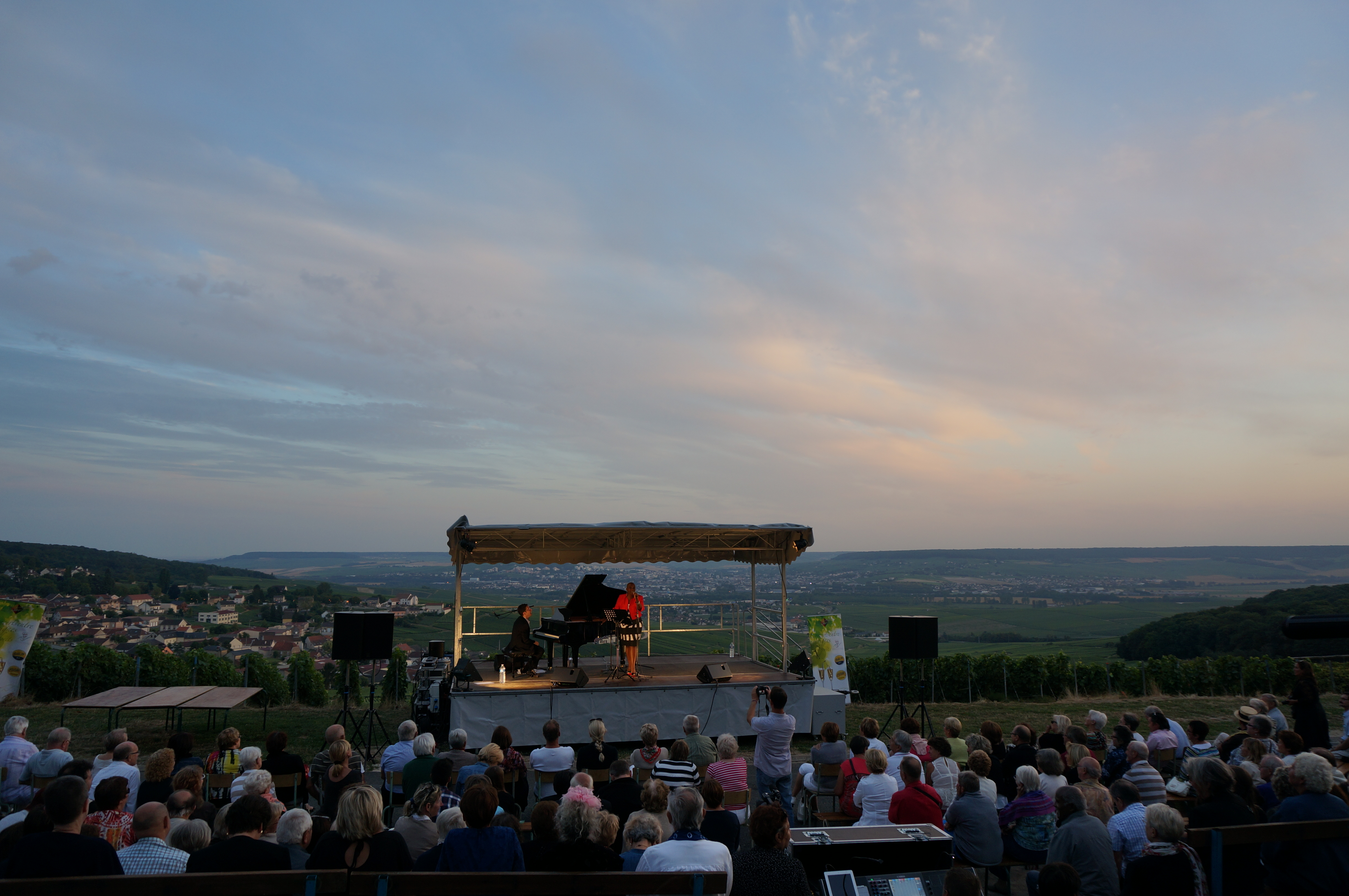 Lors des concerts entre vignes et forêts 2013 à Champillon; Magloire et Champillon .